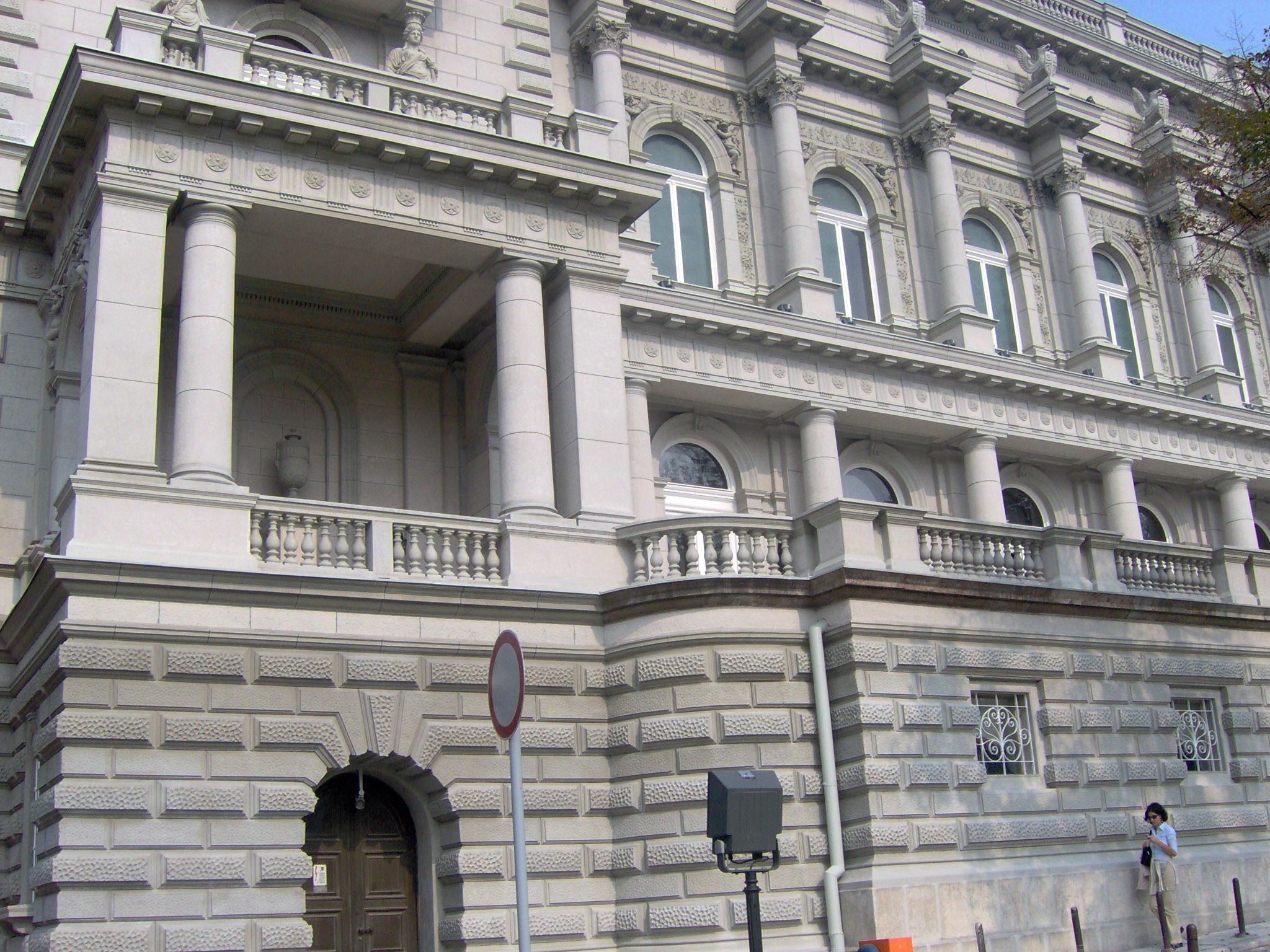 Stari Dvor (Old Palace) in Belgrade, Serbia/Détail de la façade de Stari Dvor (le Vieux Palais) à Belgrade, Serbie